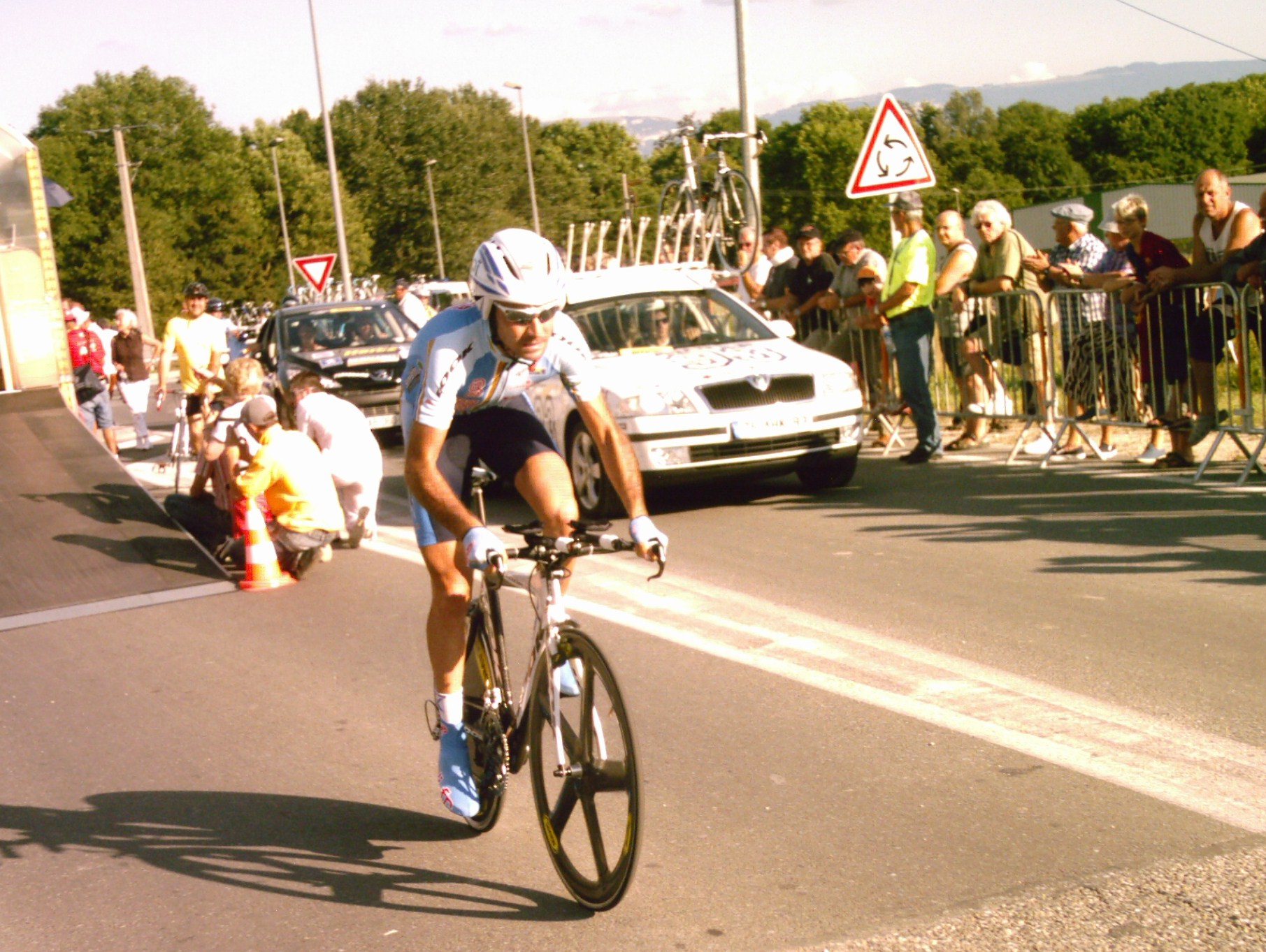 Maxime Méderel au départ du contre-la-montre de la troisième étape b du Tour de l'Ain 2009.